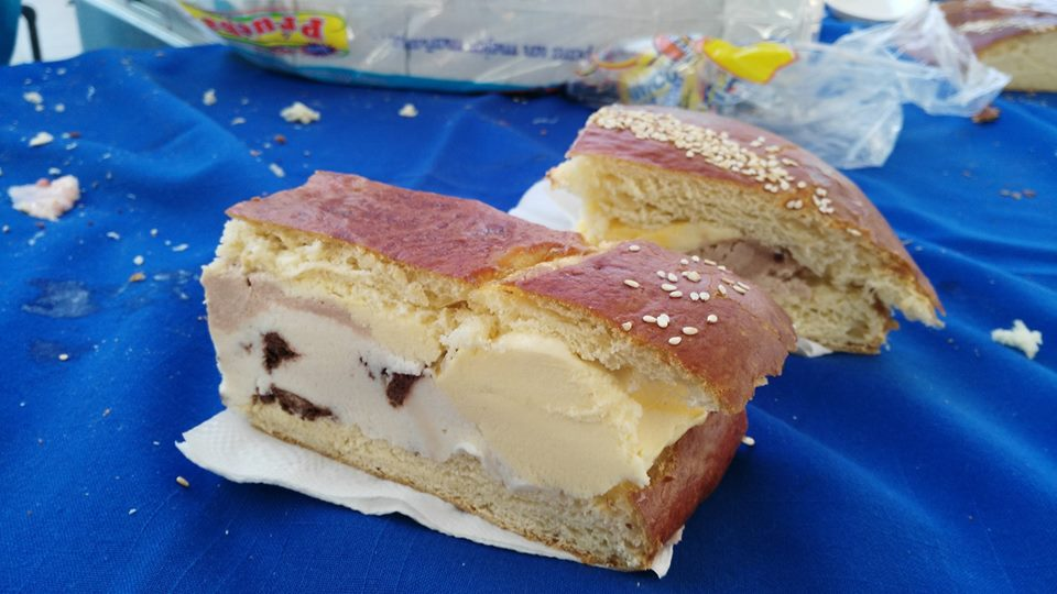 Pan con helado en la feria del cacao 2017